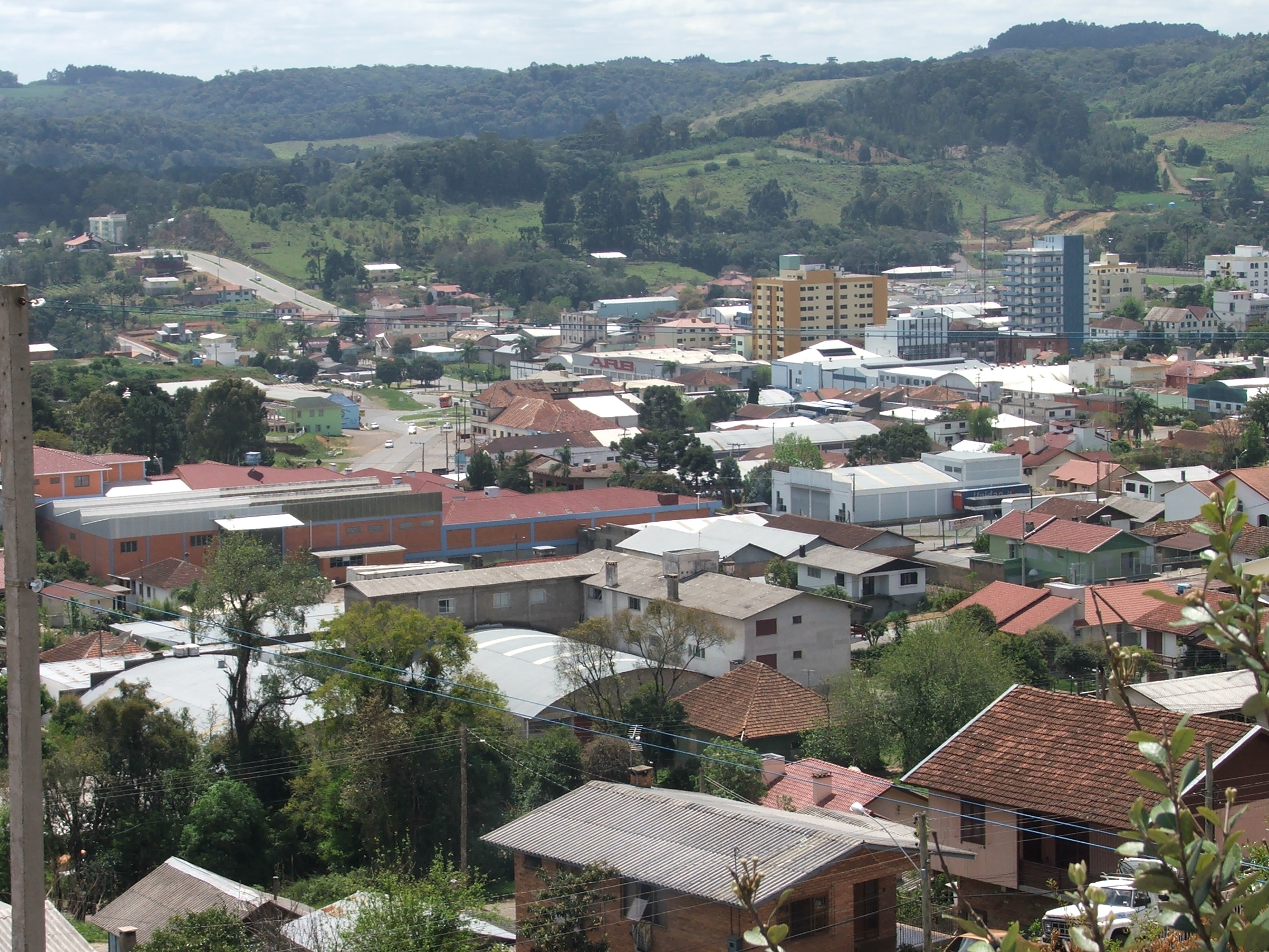 Vista de São Marcos